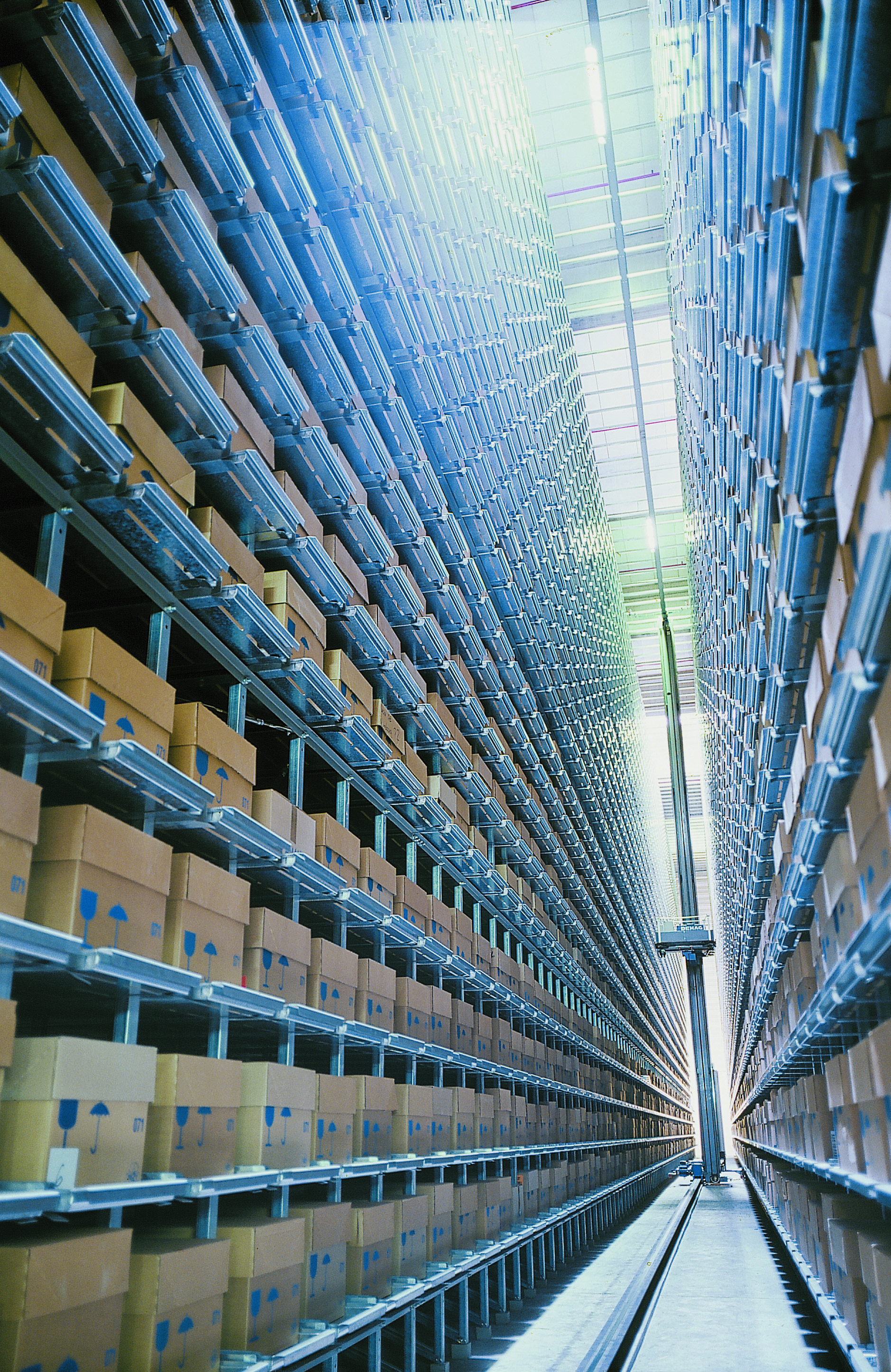 AMANN Hochregallager im Industriezentrallager Erligheim